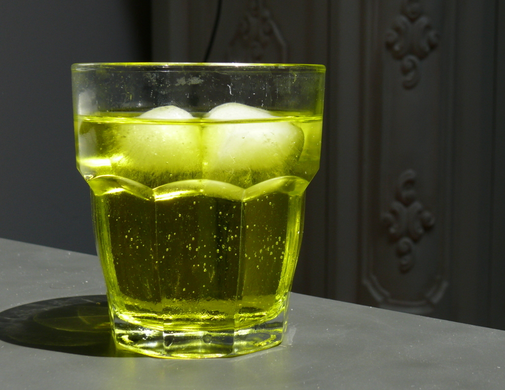 Un bicchiere di cedrata Tassoni.